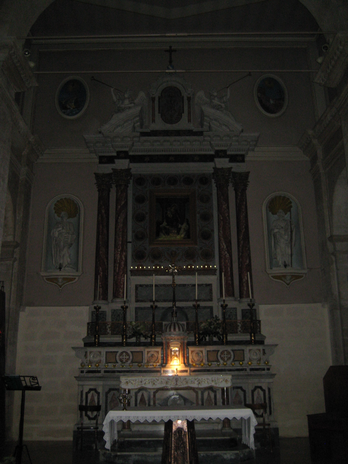 Bisceglie. Chiesa di San Matteo. Altare dedicato alla Madonna del Rosario